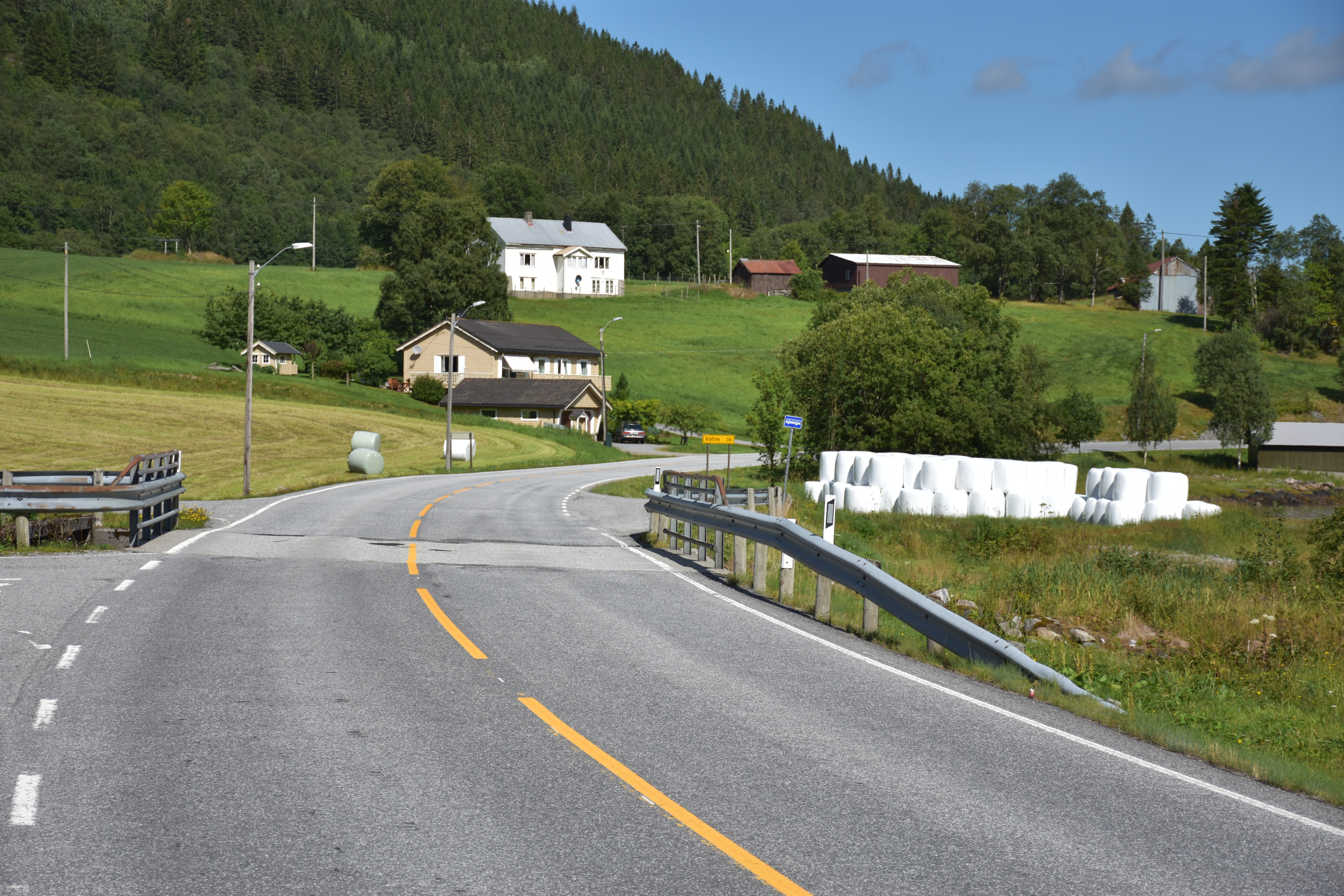 Fjordvegen (fylkesvei 661) ved Tomrefjord (Tomra)